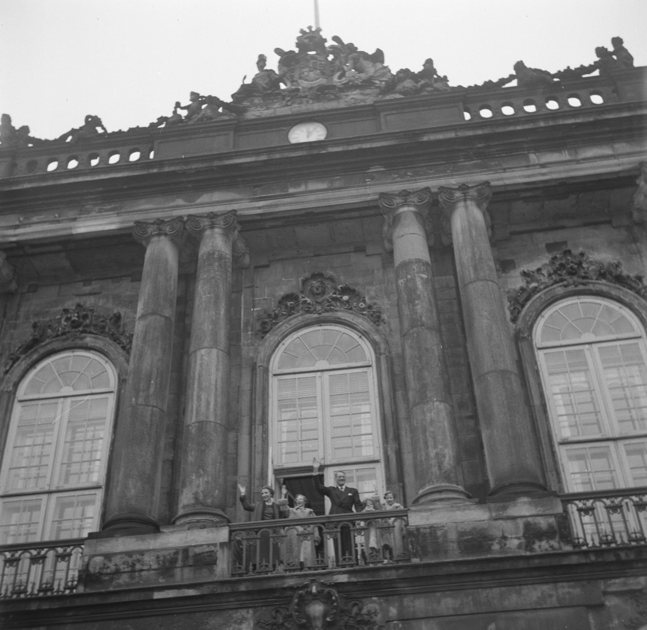 Collectie / Archief : Fotocollectie Van de Poll Reportage / Serie : 55e verjaardag van koning Frederik IX Beschrijving : De koninklijke familie op het balkon van paleis Brockdorff ter ere van de verjaardag van de koning Datum : 11 maart 1954 Locatie : Denemarken, Kopenhagen Trefwoorden : balkons, koningen, koninginnen, paleizen, prinsessen, verjaardagen Persoonsnaam : Anne Marie (prinses Denemarken), Benedikte (prinses Denemarken), Frederik IX (koning Denemarken), Ingrid (koningin Denemarken), Margrethe (kroonprinses Denemarken) Fotograaf : Poll, Willem van de, [onbekend] Auteursrechthebbende : Nationaal Archief Materiaalsoort : Negatief (zwart/wit) Nummer archiefinventaris : bekijk toegang 2.24.14.02 Bestanddeelnummer : 252-8663